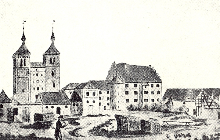 Kloster_Auhausen_an_der_Woernitz_vor_1818